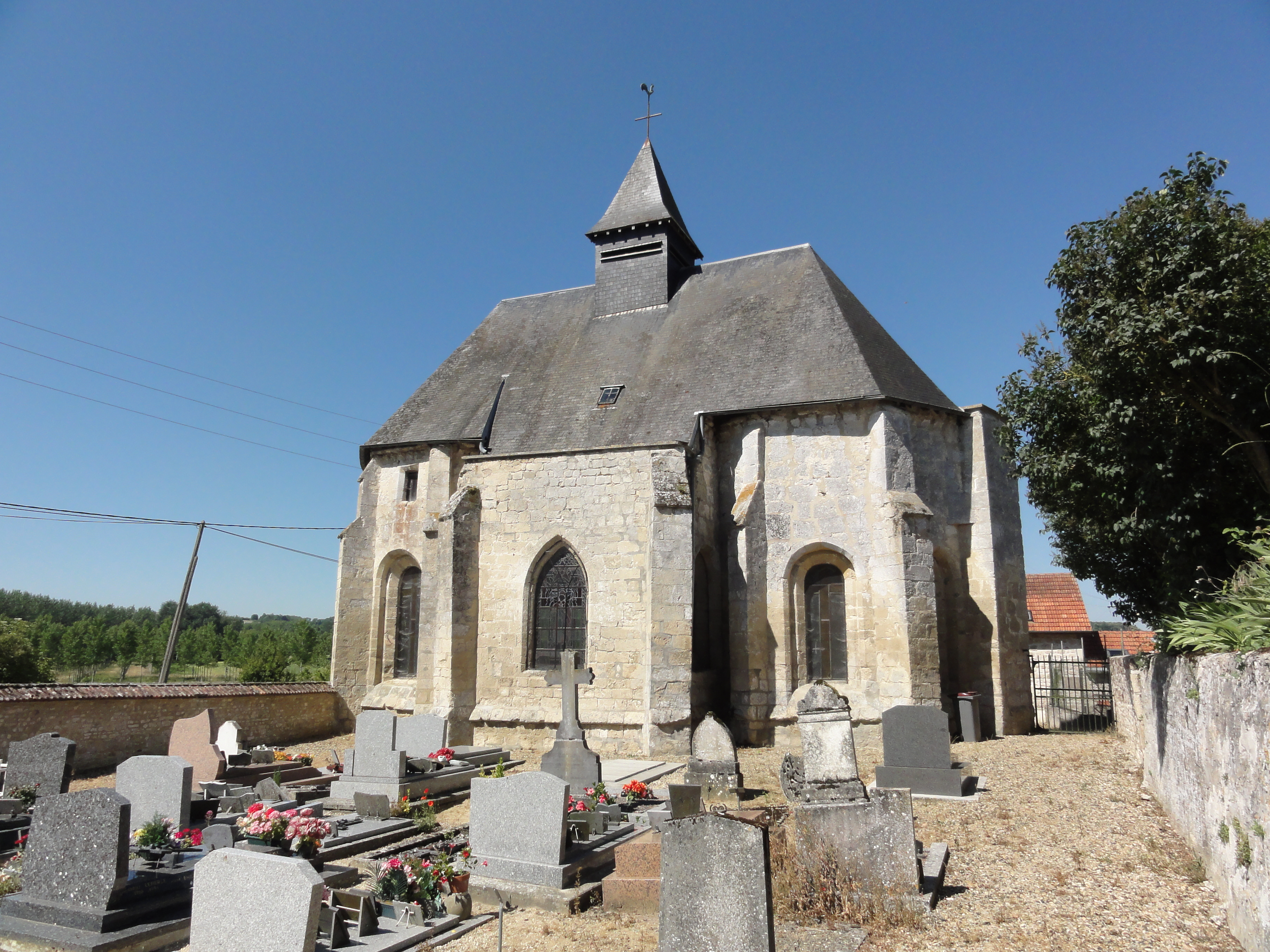 Révillon (Aisne) Église